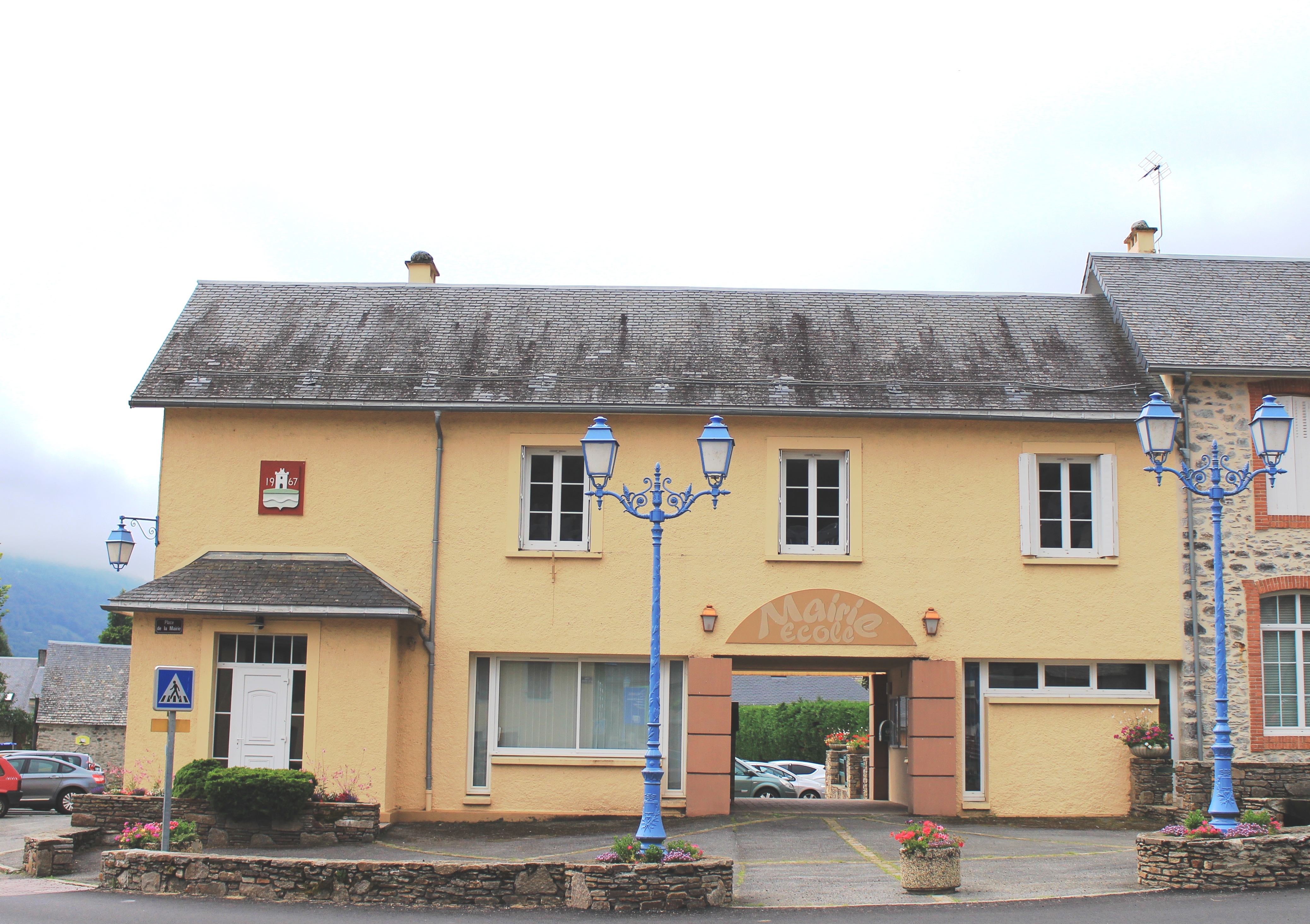 Mairie de Génos (Hautes-Pyrénées)